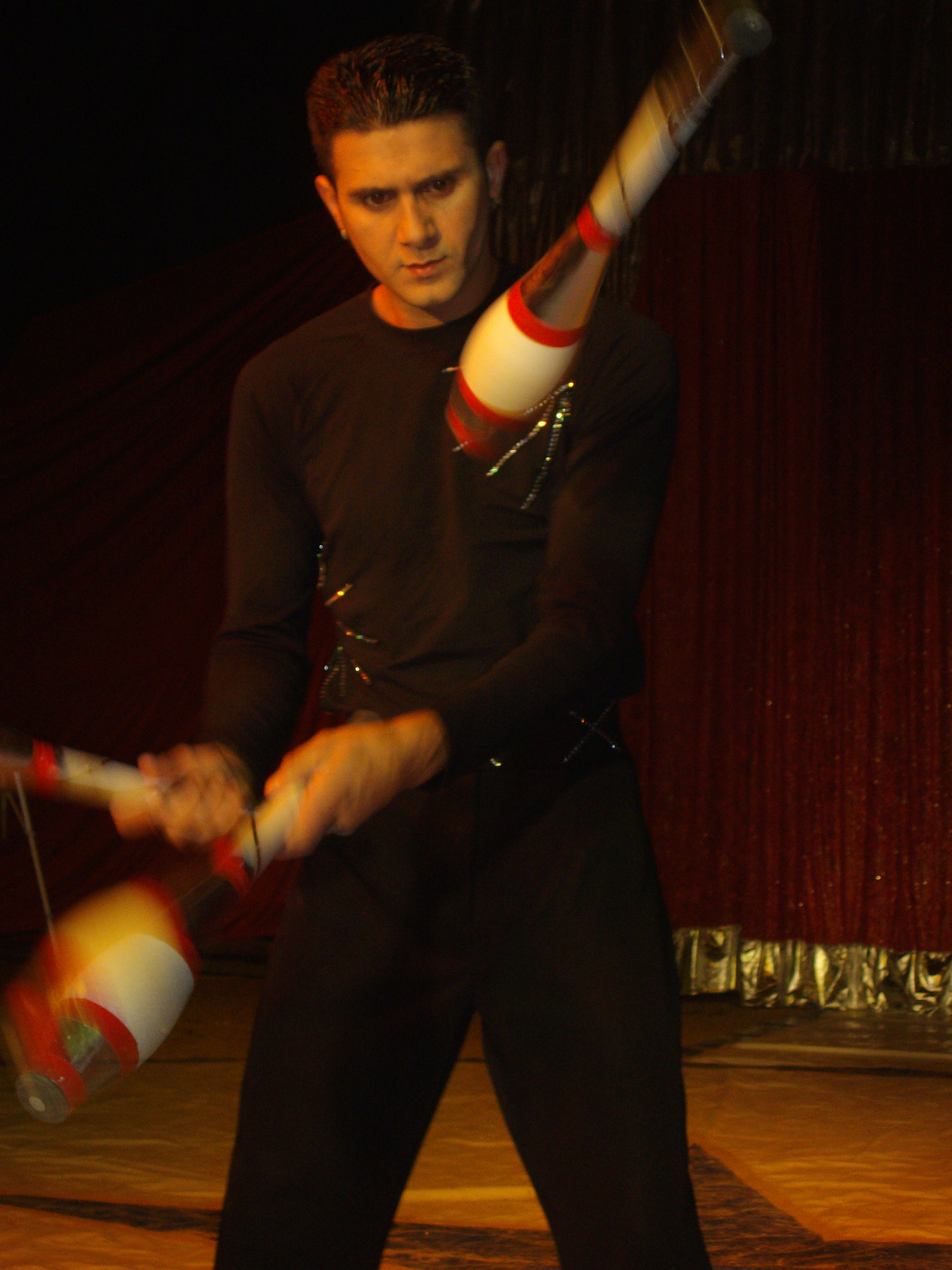 Pedro Elis 2010 Continental Circus